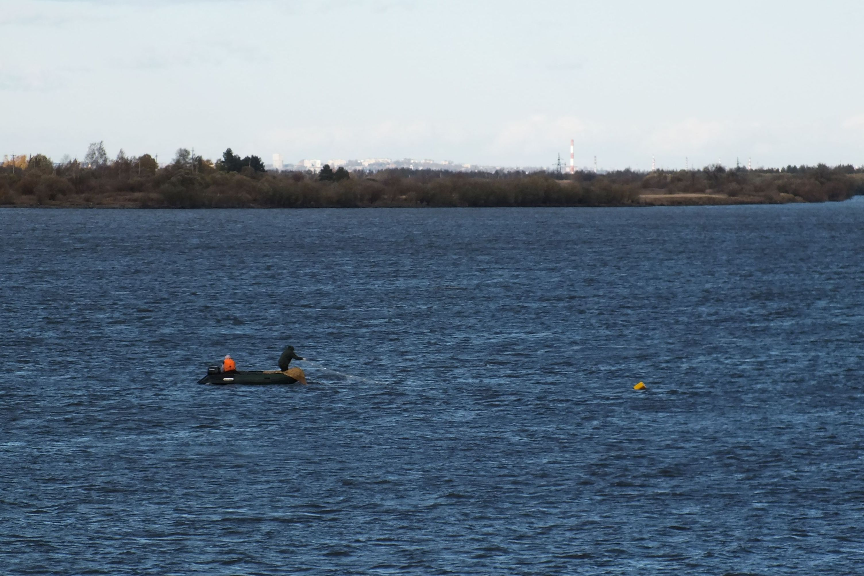 Лицензионный лов кеты, Хабаровский край